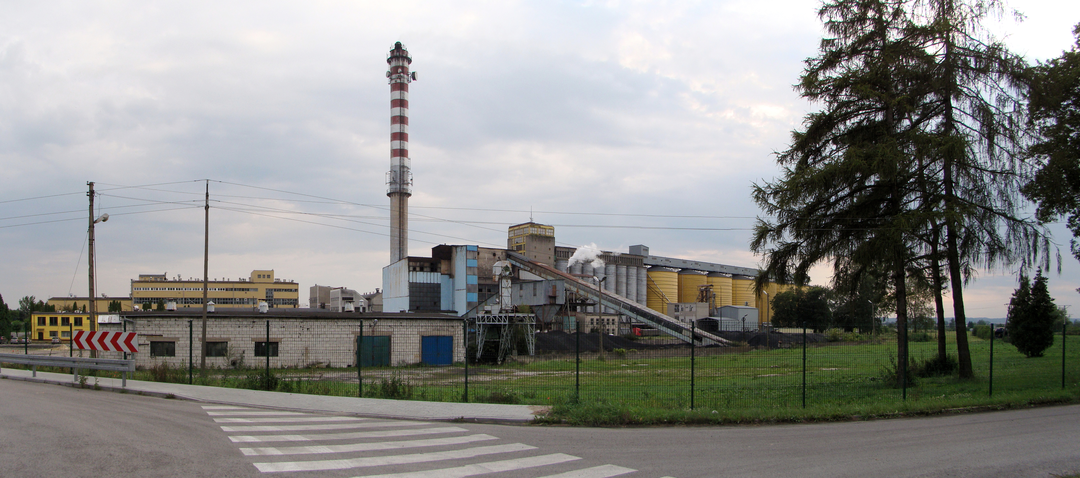 Tukové závody v obci Bodaczów, Polsko